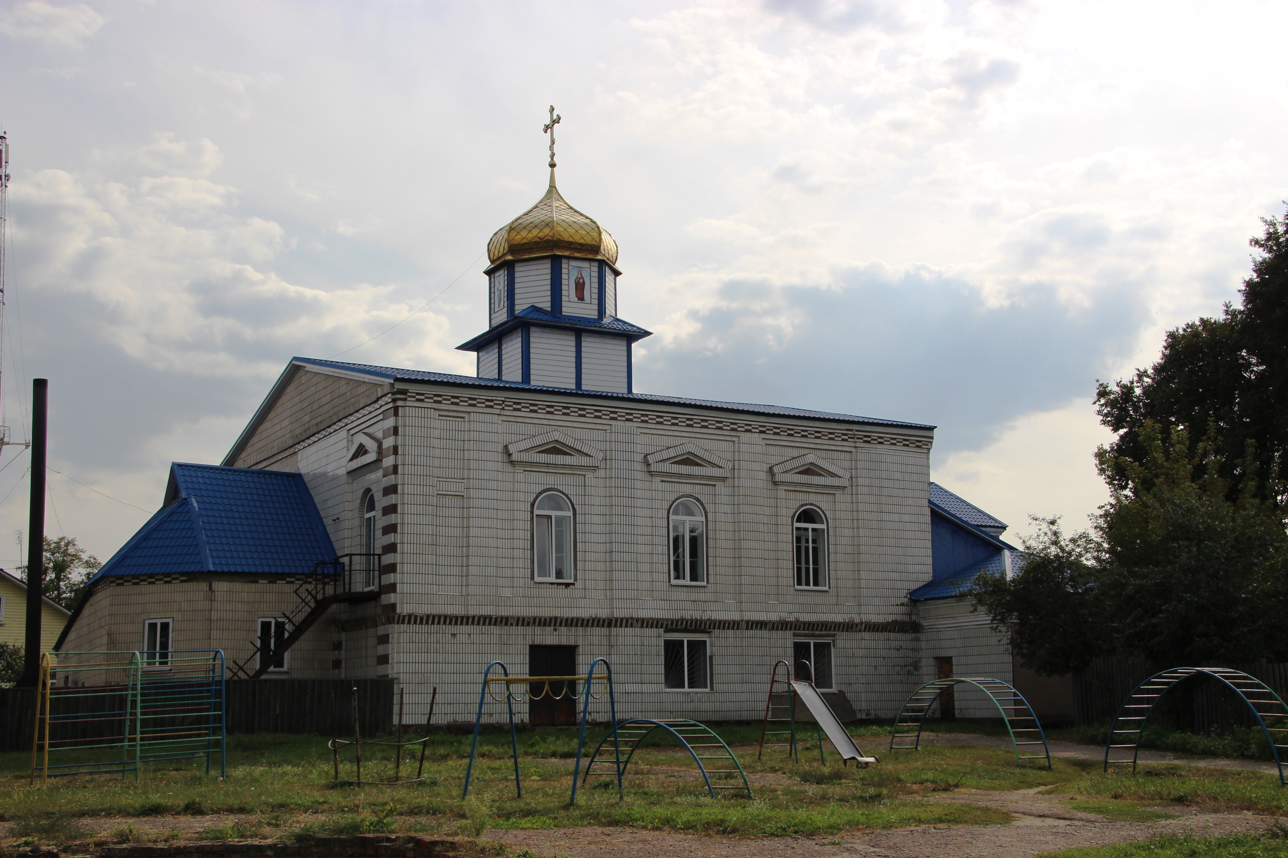 Різдва Богородиці церква, Середина-Буда, вул. К. Лібкнехта, 3.